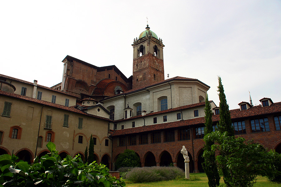 Il Chiostro della Canonica - Novara foto by Alessandro Vecchi - 2006